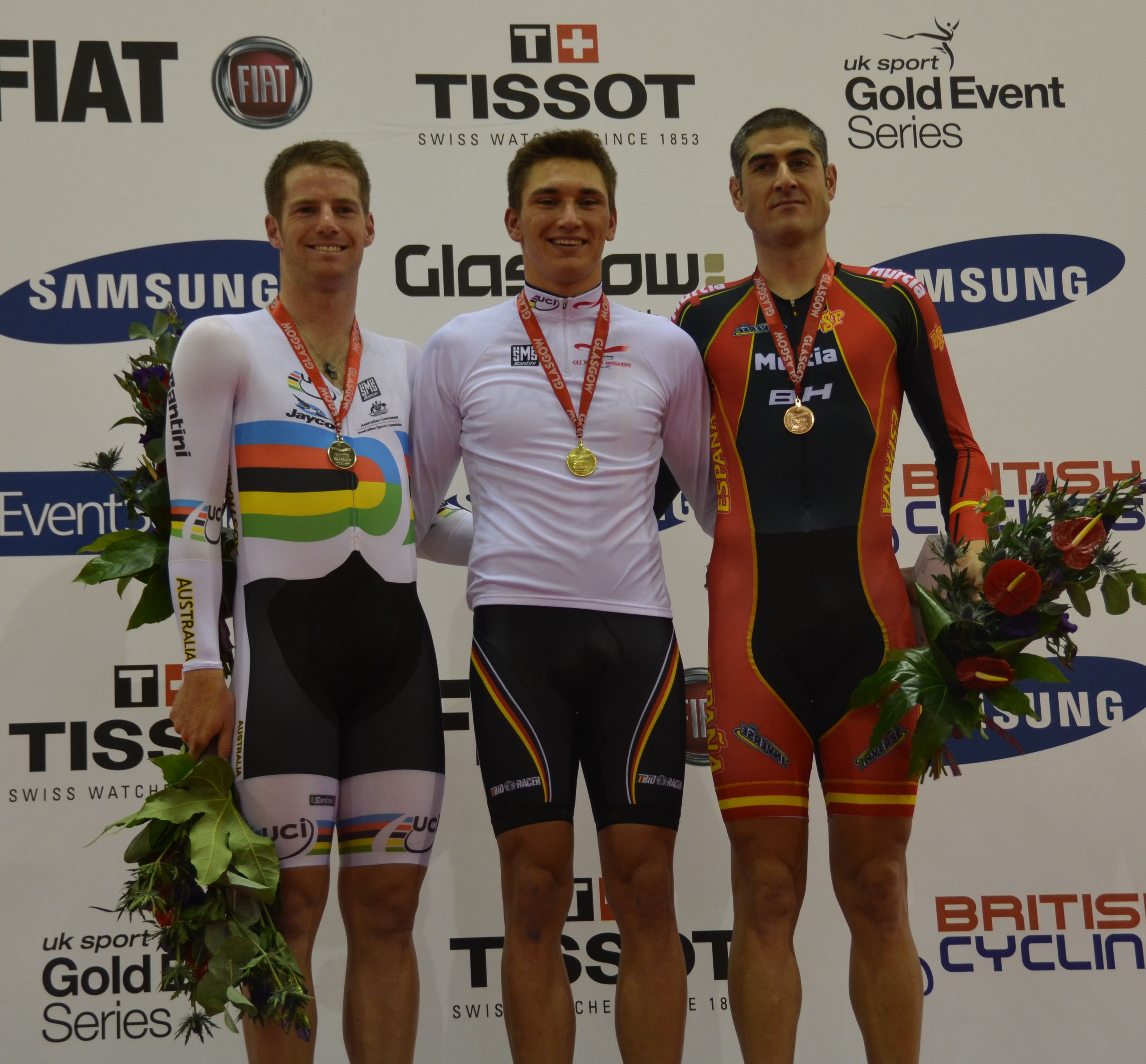 Podium Omnium in Glasgow, v.l.n.r.: Glenn O'Shea, Lucas Liß, Unai Elloriaga